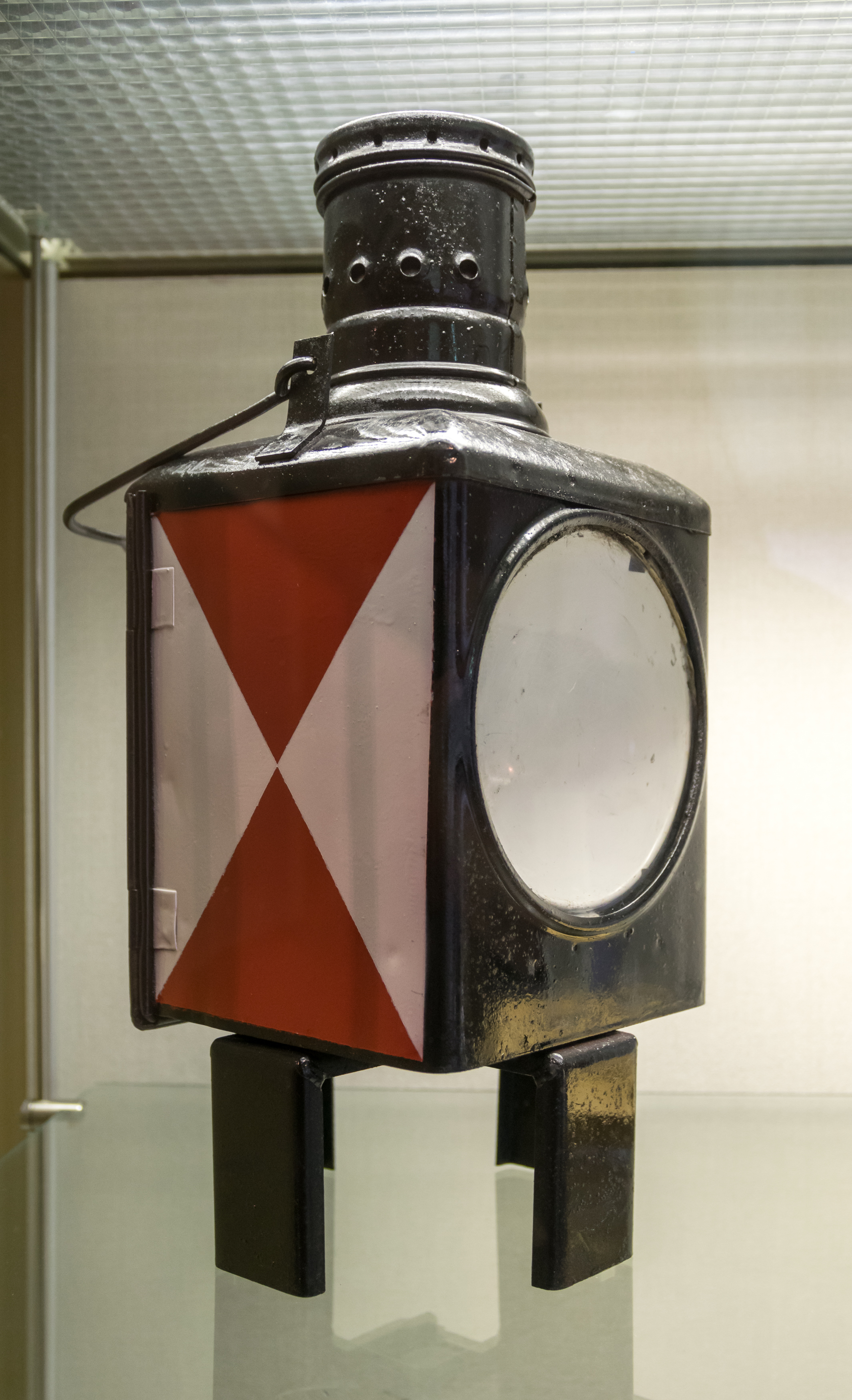 Glasmuseum Boffzen; Zugendlaterne der 1940er Jahre mit Glaszylinder der Firma Noelle + von Campe, Boffzen